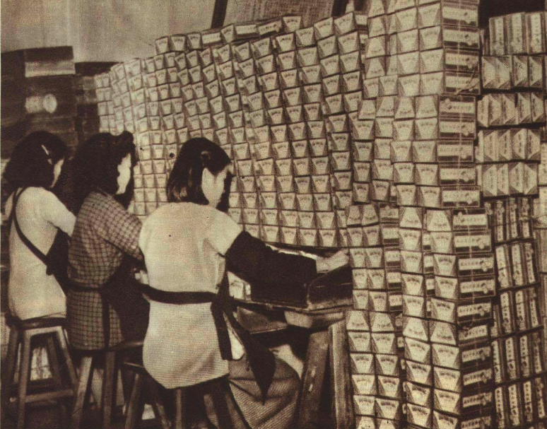 1952年广州兴华电池厂